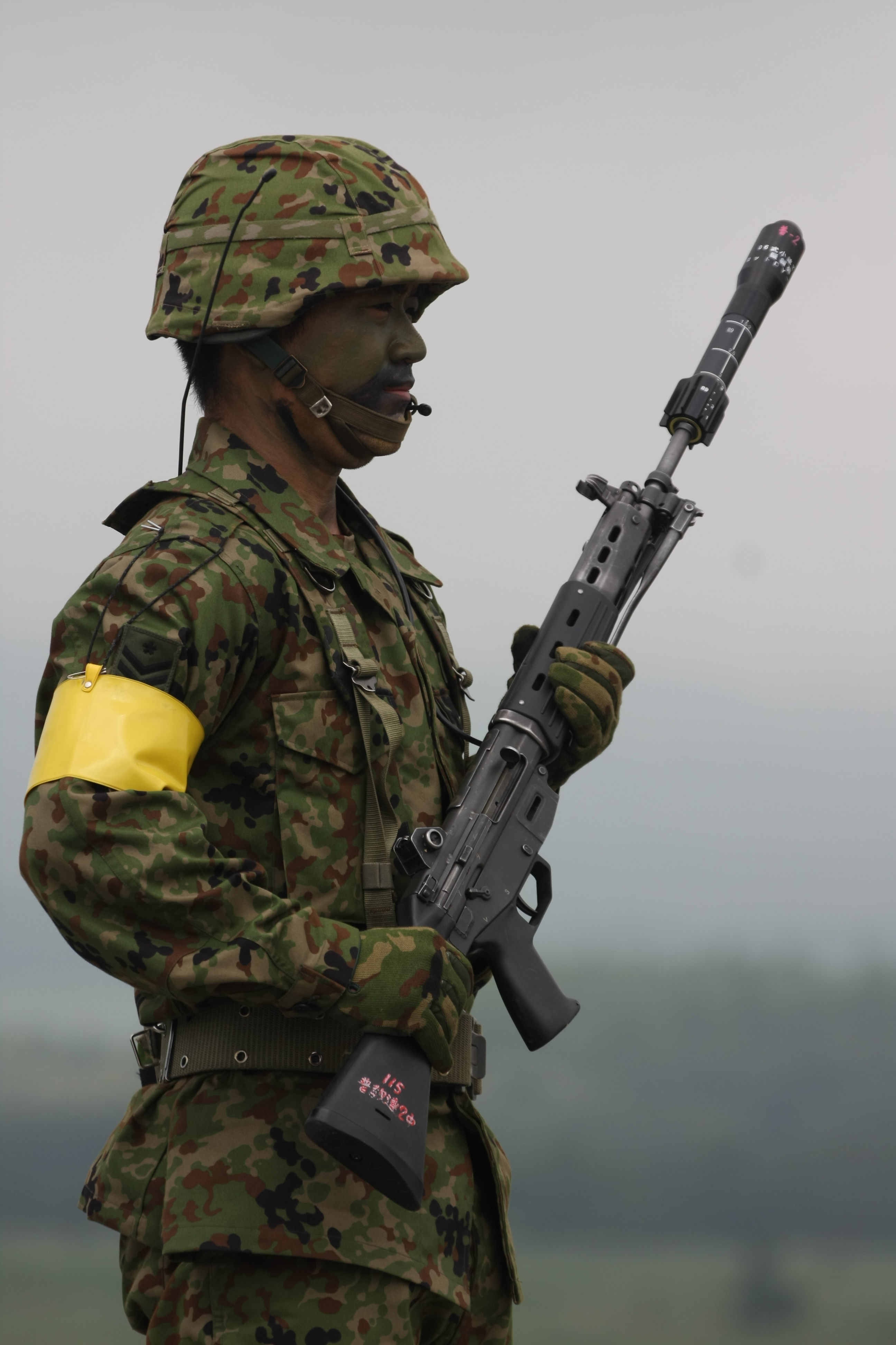 89式小銃に06式小銃てき弾を装着した自衛隊員